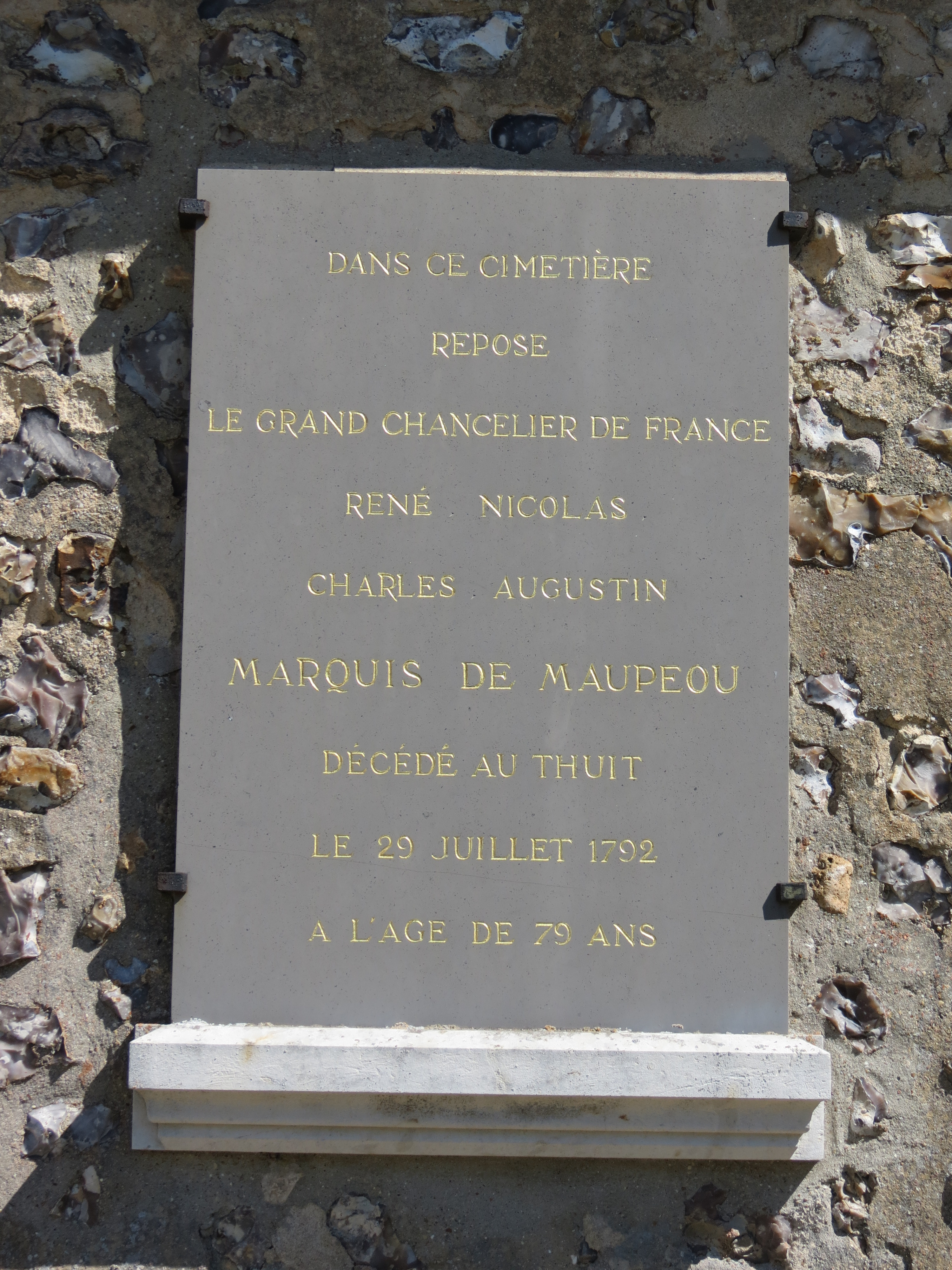 Plaque commémorative du chancelier René Nicolas Charles Augustin de Maupeou sur le mur de l'église Saint-Martin.